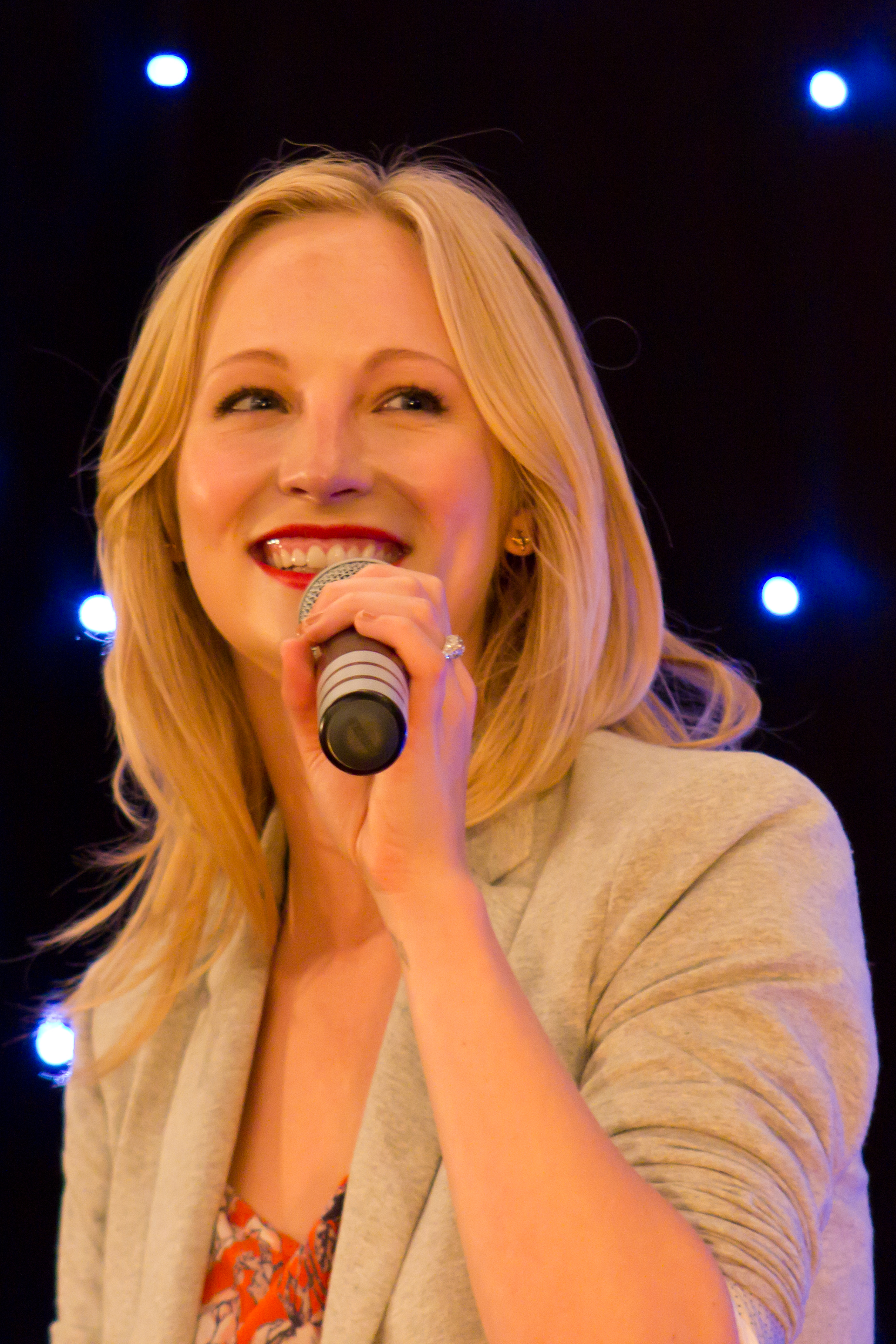 Candice Accola